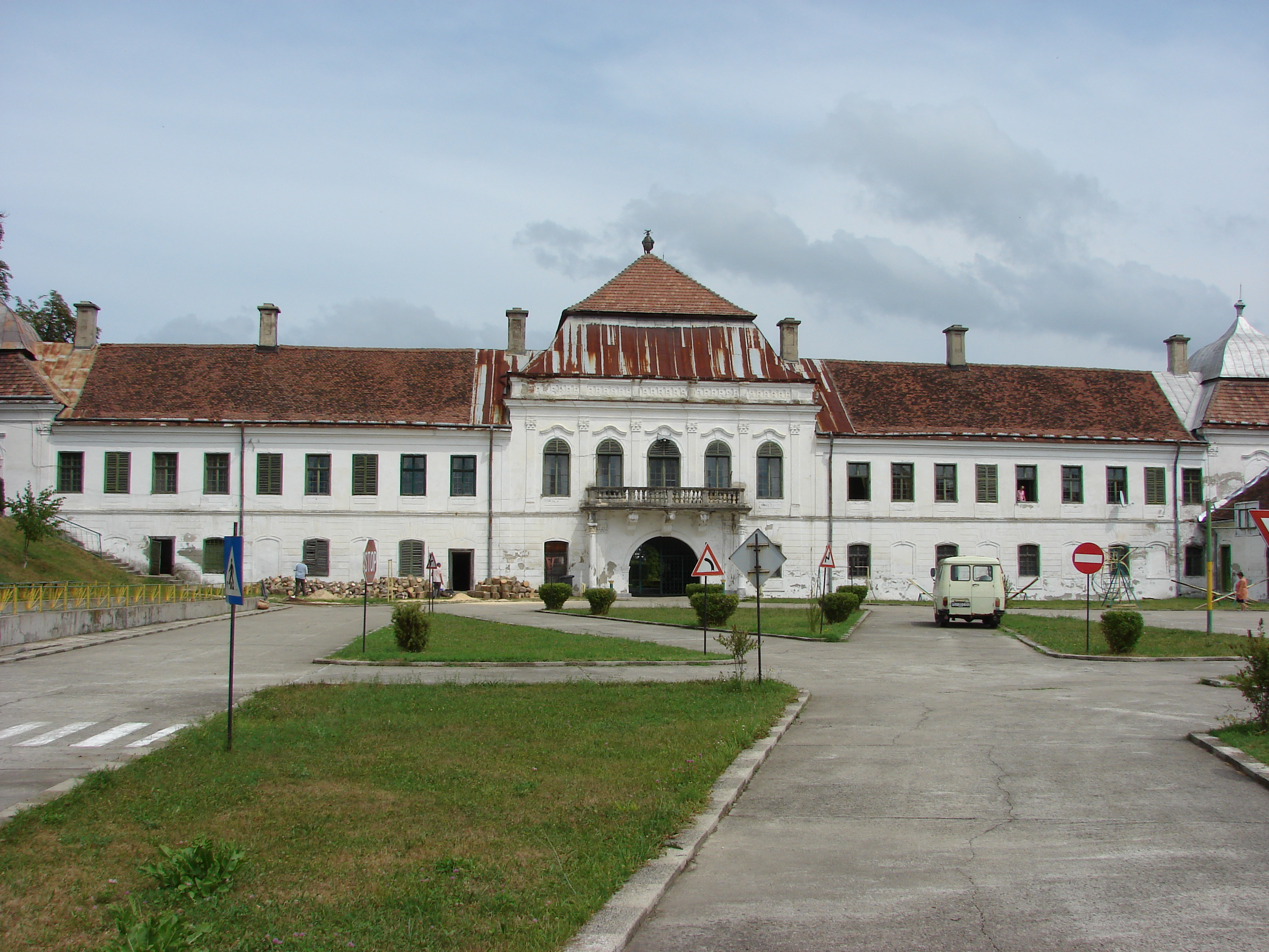 Poza 3